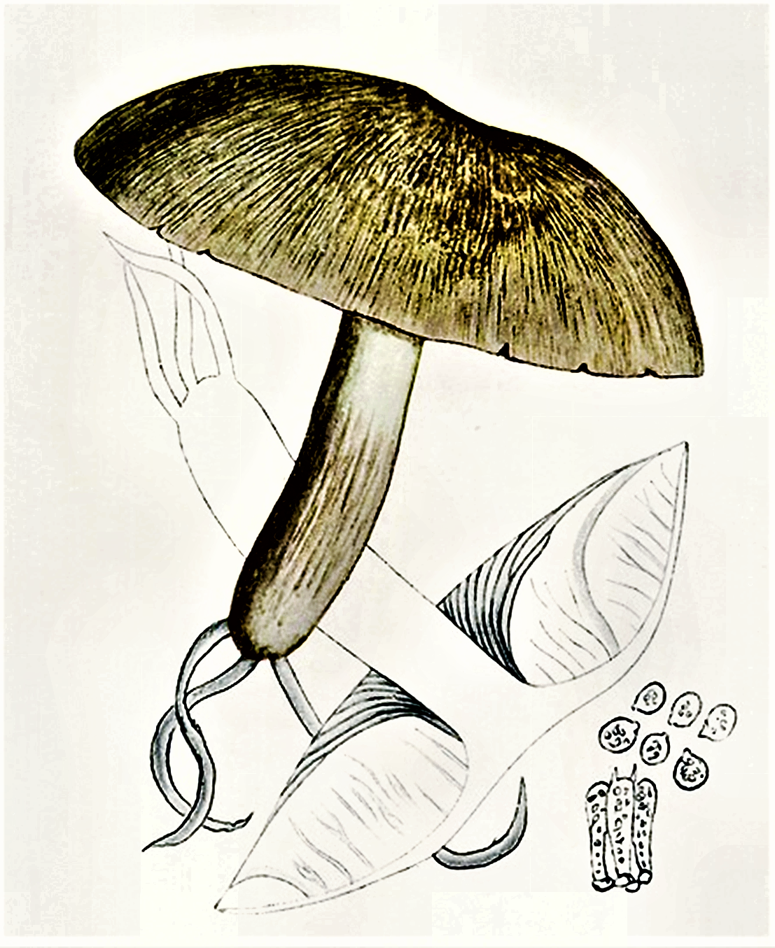 Giacomo Bresadola: Collybia grammocephala (Bull.), 1793 Quél. (1888), heute Megacollybia platyphylla (Pers., 1796) Kotl. & Pouzar (1972)